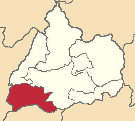 Mapa localizador del cantón en Cotopaxi, Ecuador